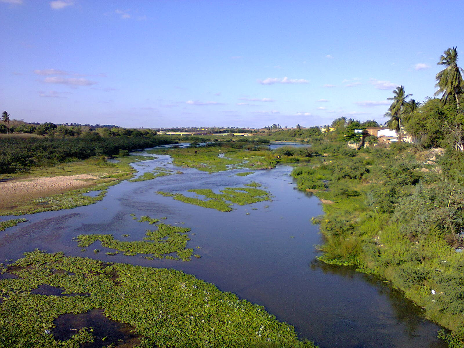 Trecho do Rio Paraíba em que passa pelo município de Itabaiana, estado da Paraíba, Brasil.